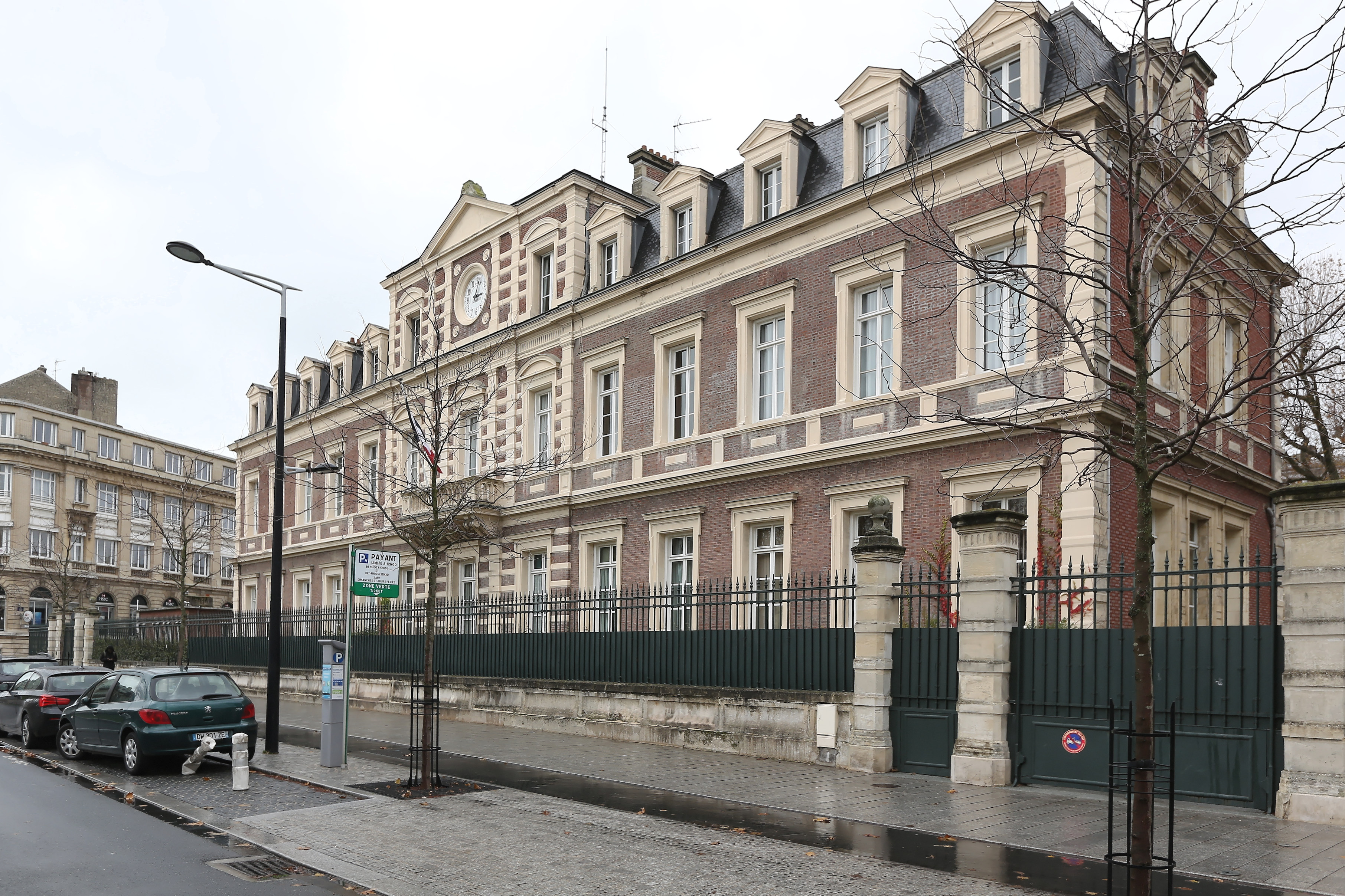 La sous-préfecture